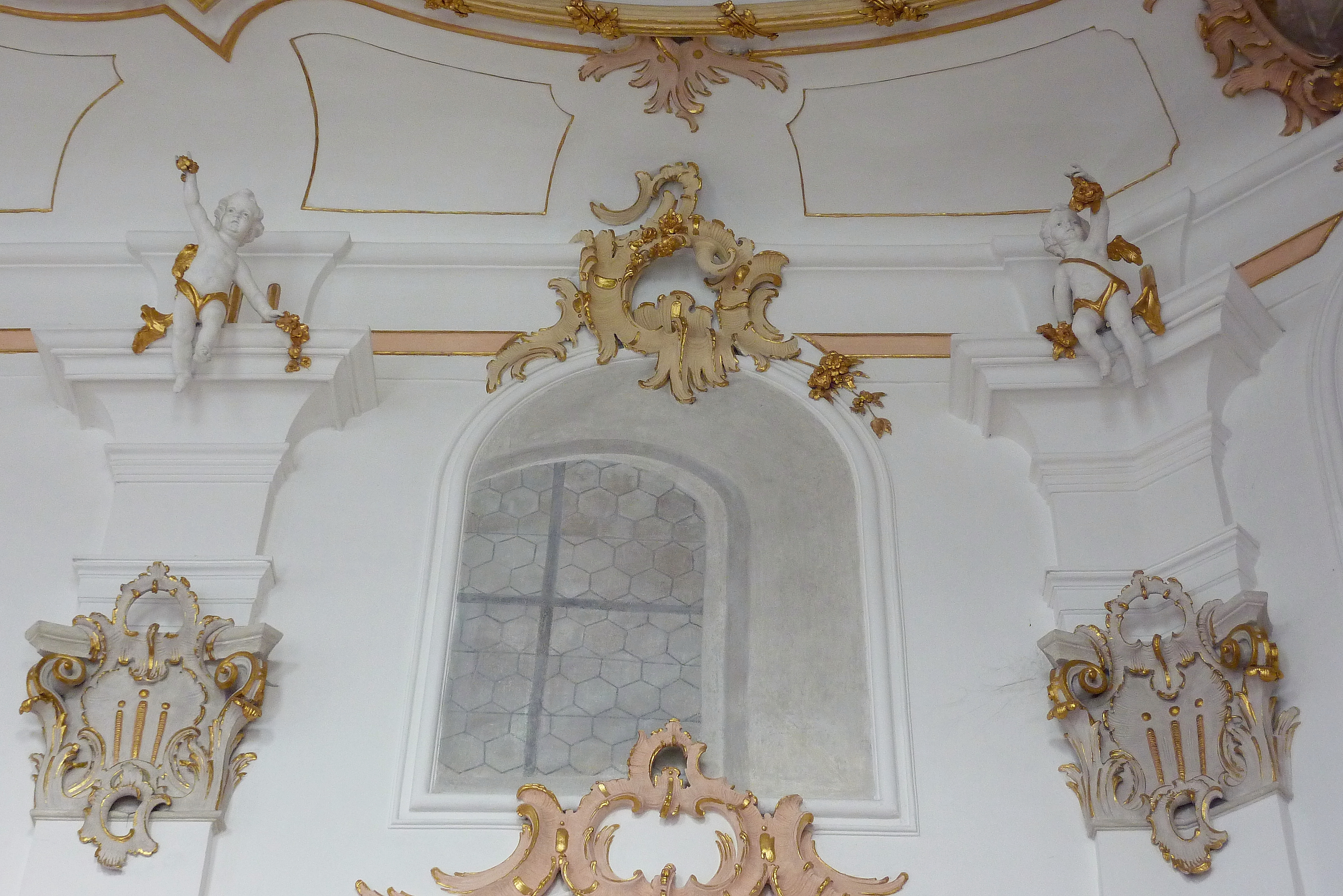 Katholische Pfarrkirche St. Michael in Lutzingen, einer Gemeinde im Landkreis Dillingen an der Donau (Bayern), Stuckdekor im Chor, vermutlich von Bartholomäus Hoiß, von 1767, Fenster in Trompe-l’œil-Malerei